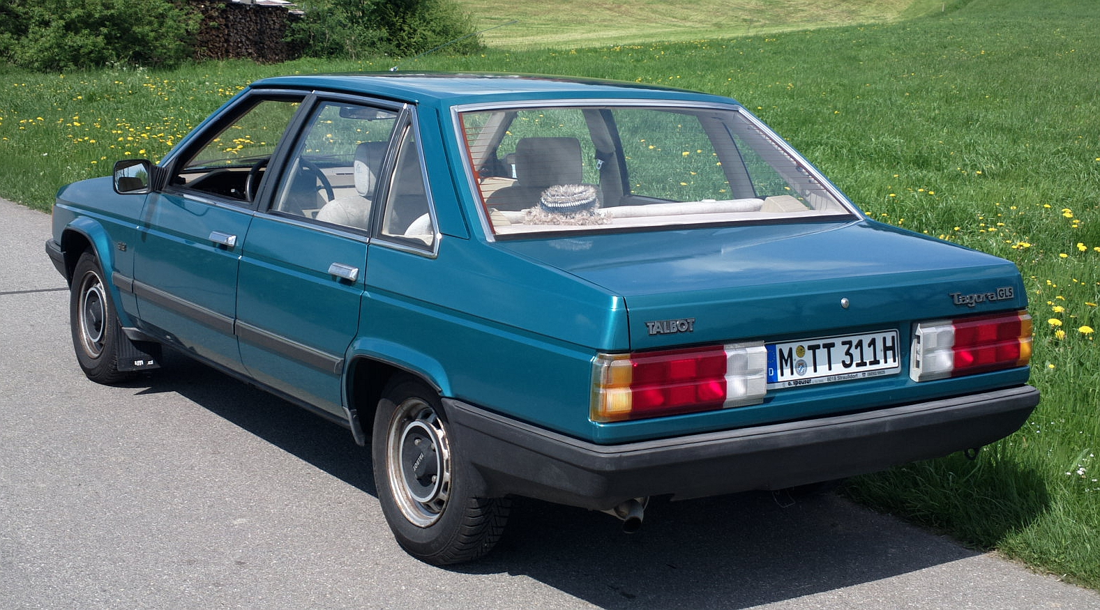 Talbot Tagora GLS 1981